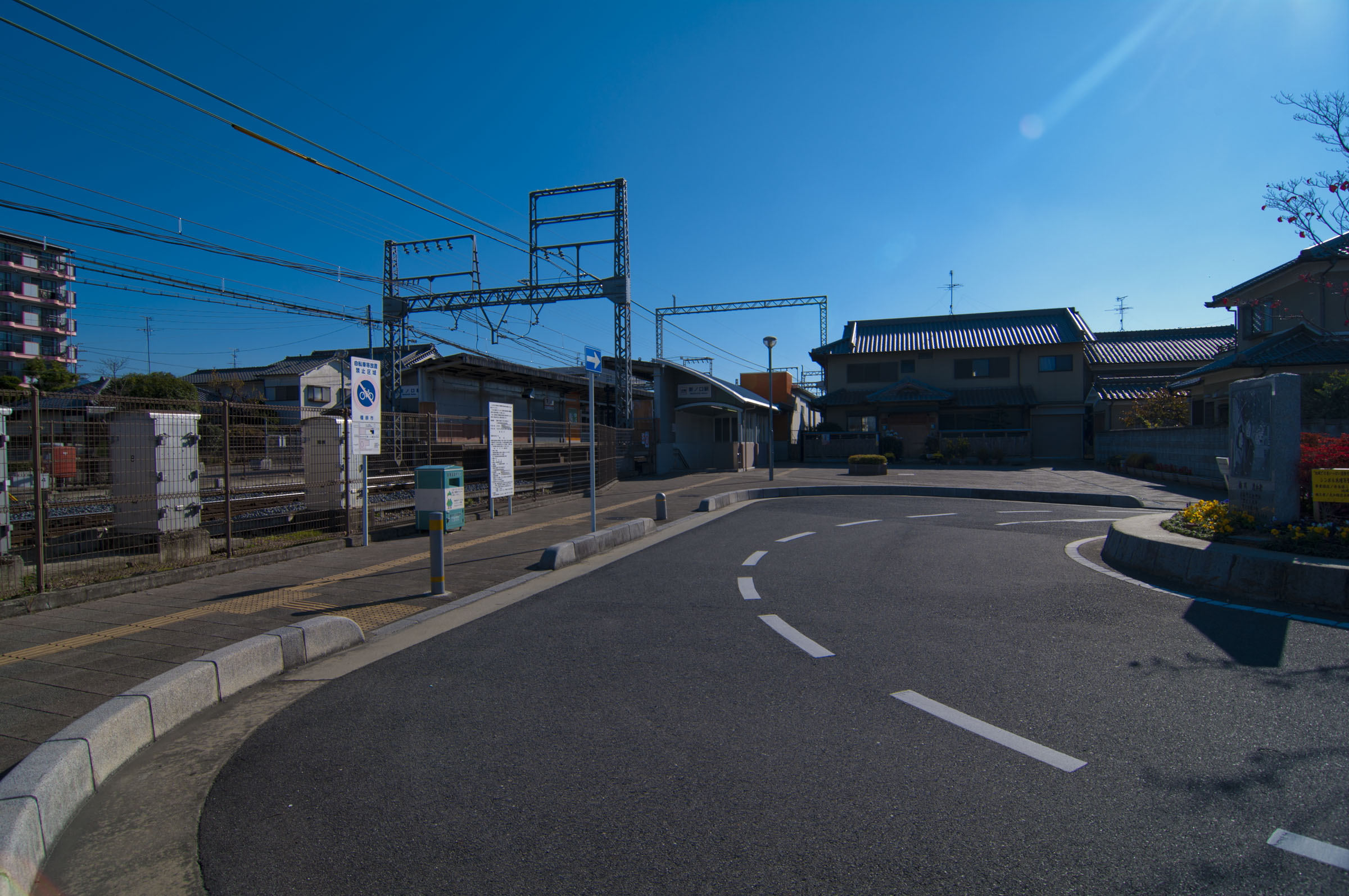 近鉄橿原線新ノ口駅駅舎